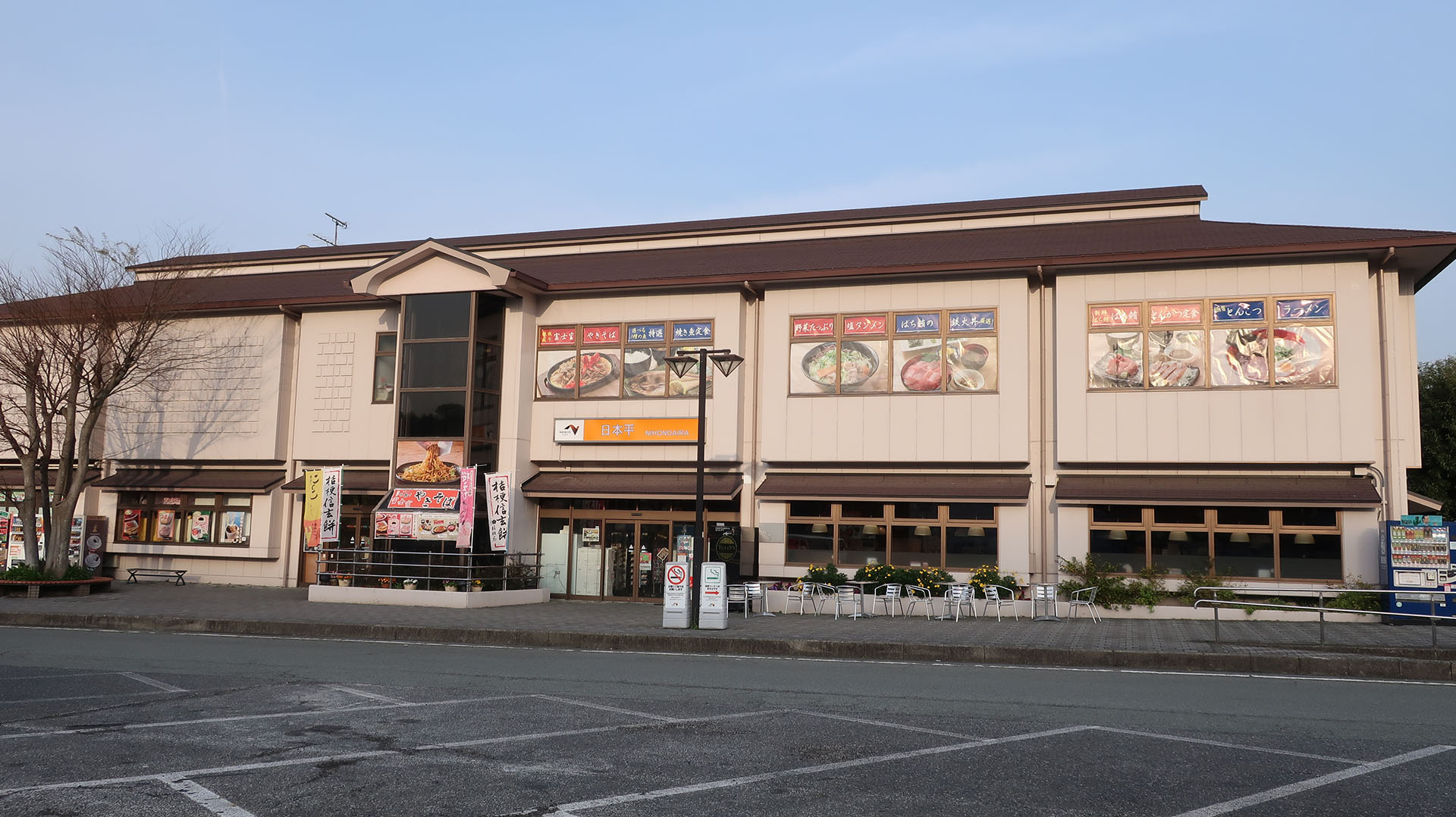 東名高速道路 日本平PA